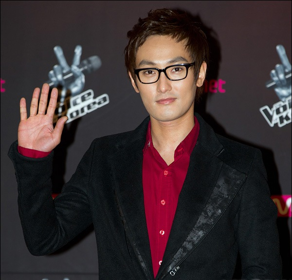 강타. '보이스코리아' 제작발표 및 하이라이트 시사회에서